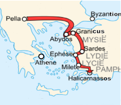 Alexander de Grotes tocht van Pella tot Halicarnassos